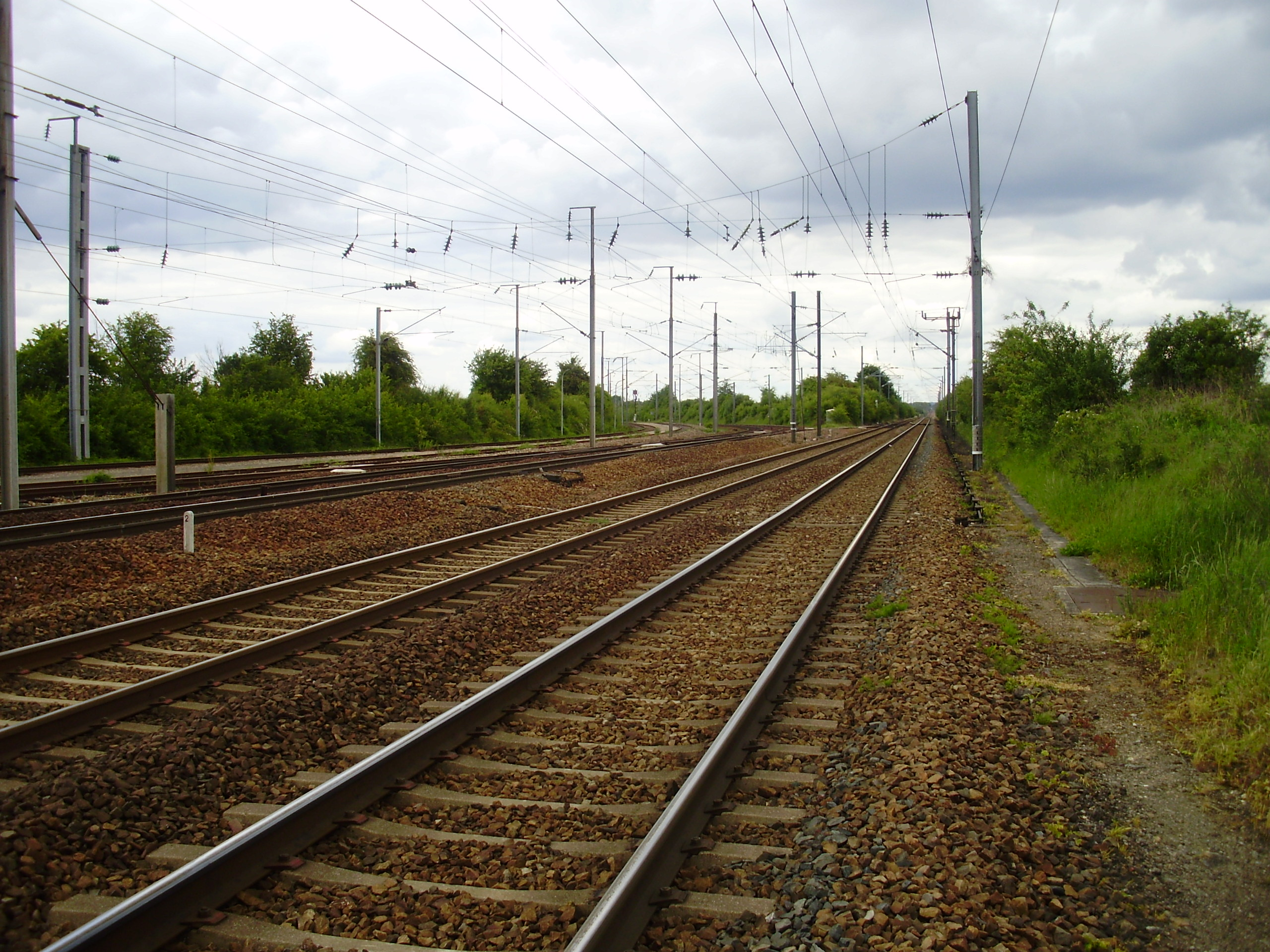 Gare d'Ormoy-Villers, Oise, France : bifurcation à 700 m environ au nord de la gare entre, à gauche, la ligne d'Ormoy-Villers à Boves (Somme) et, à droite, la ligne de La Plaine (Seine-Saint-Denis) à Hirson (Aisne) (vue du côté est des voies)